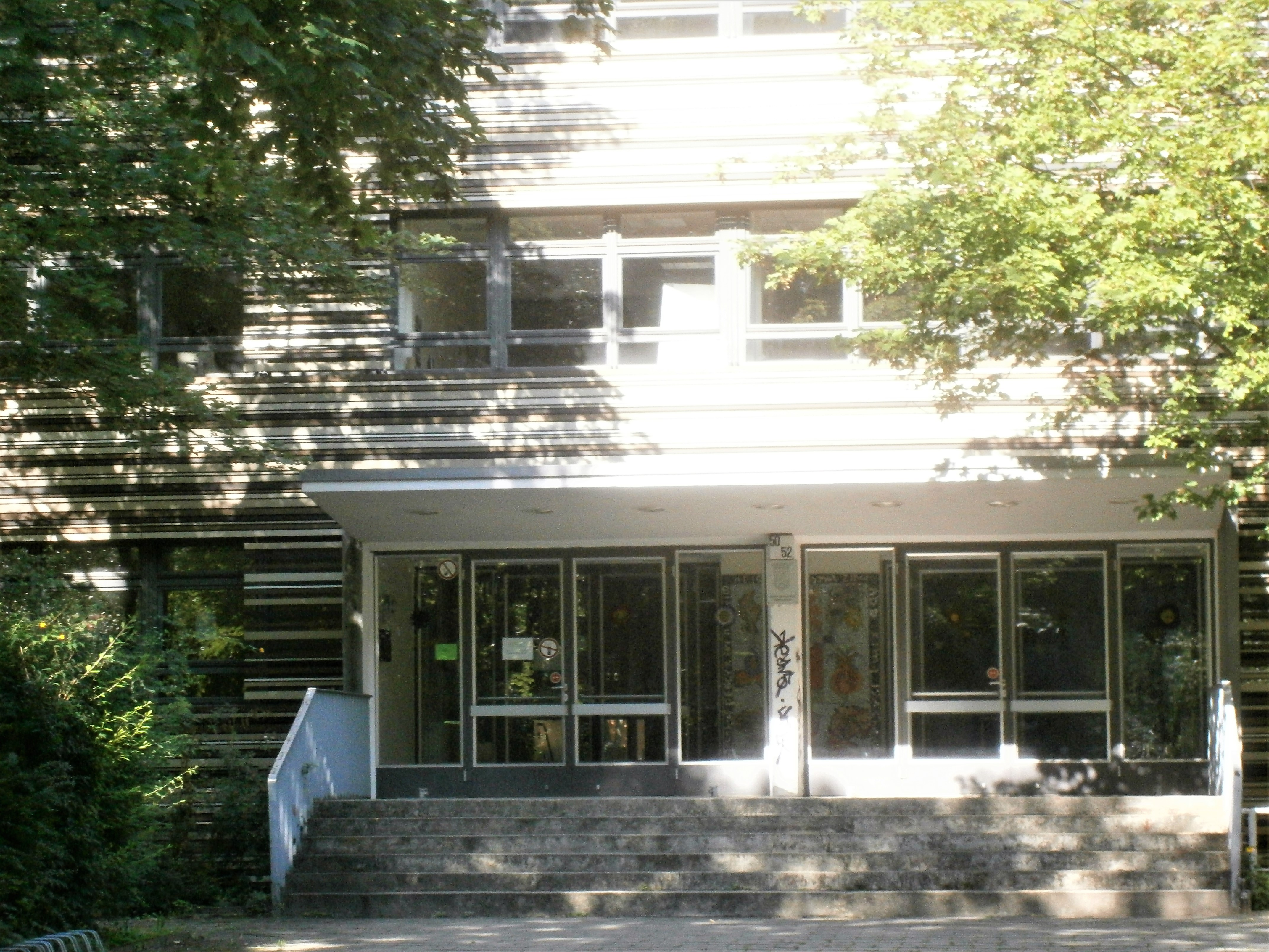 Die Andreasstraße ist eine Straße im Berliner Bezirk Friedrichshain-Kreuzberg, Ortsteil Friedrichshain. Angelegt wurde sie 1862 auf vorherigen Gartenland und 1863 benannt. Bis um 1900 waren die Grundstücke bebaut und bis 1930 wurde verdichtet. Bei Luftangriffen im Zweiten Weltkrieg wurde die Gebäude schwer getroffen. So ist die Straße seit den 1950er Jahren mit wiederhergestellten Altbauten, aber besondres durch Plattenbau-Wohnblöcke aber seit 1990 auch durch Hotel- und Bürobauten im Umfeld des Ostbahnhofs charakterieisiert. Das Bild zeigt:Blumen-Grundschule Andreasstraße 52